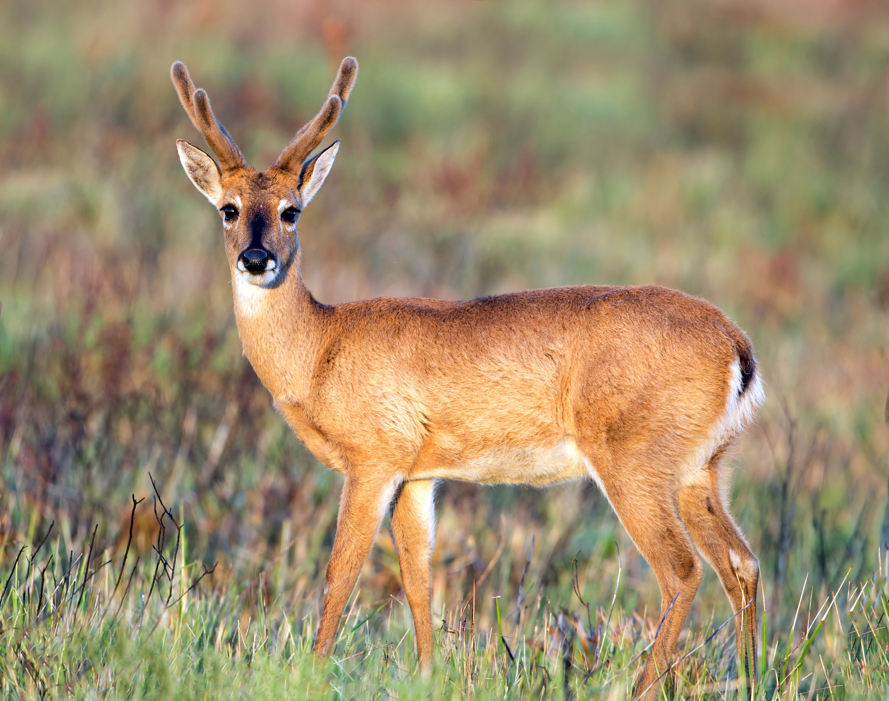 Veado-campeiro macho no Parque Nacional da Serra da Canastra